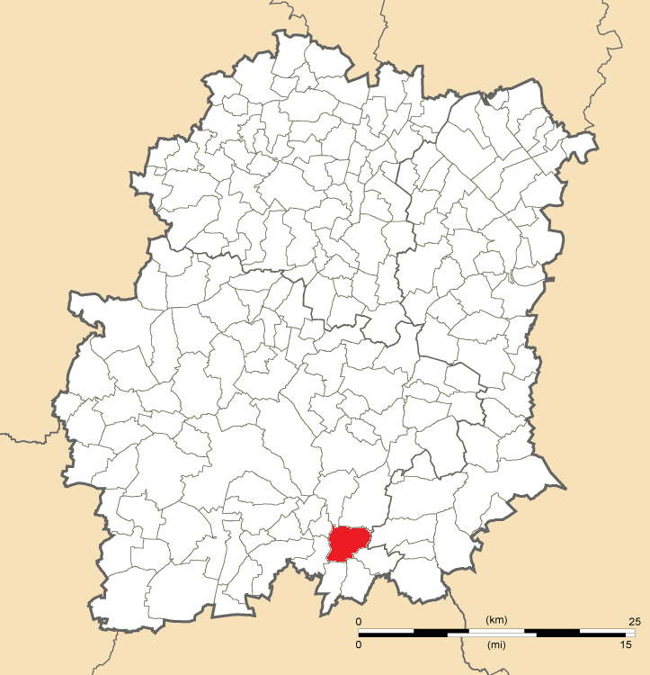 Carte de position de Mespuits en Essonne (91)